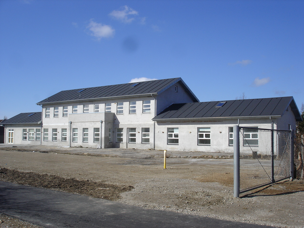 Middelfarts gamle station fra sporsiden